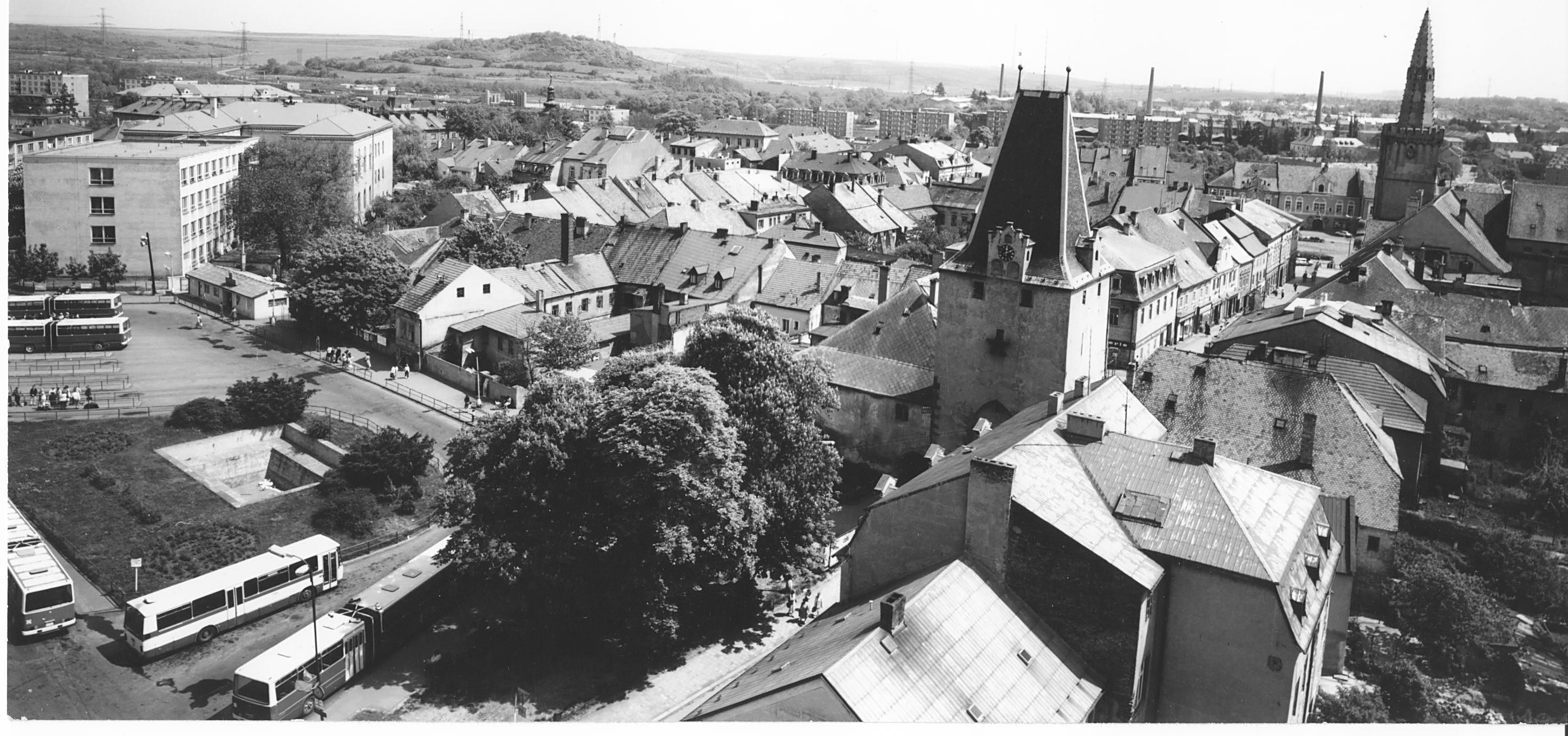 Kadaň, dnes Studentské náměstí, rok 1989